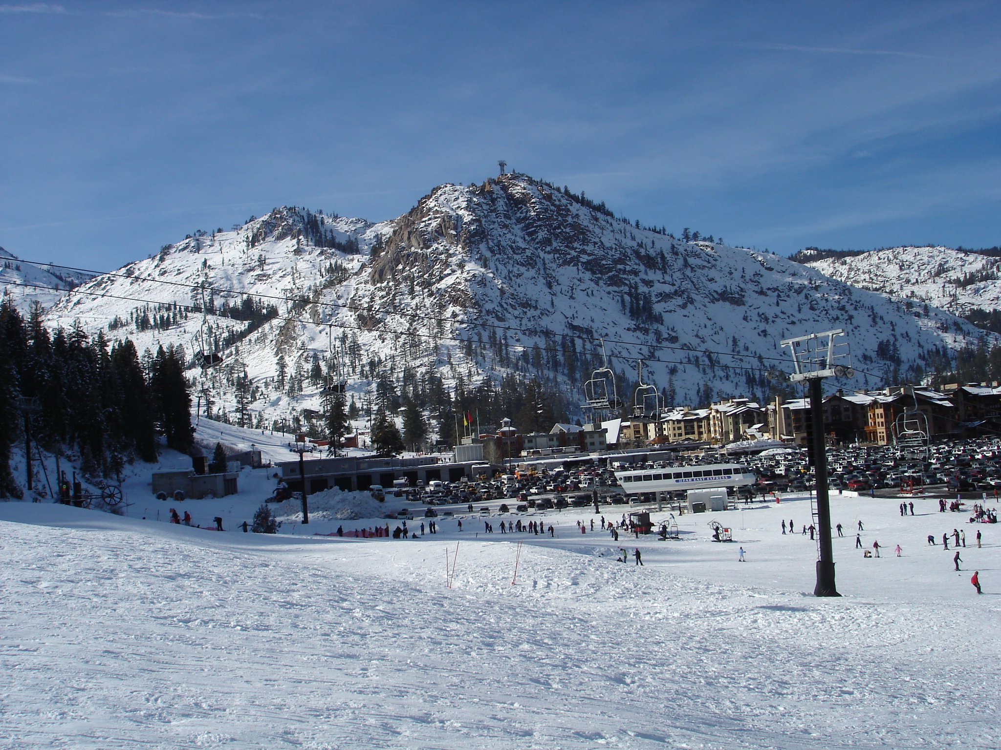 Изглед от Ски курорт Скуо Вали, Калифорния